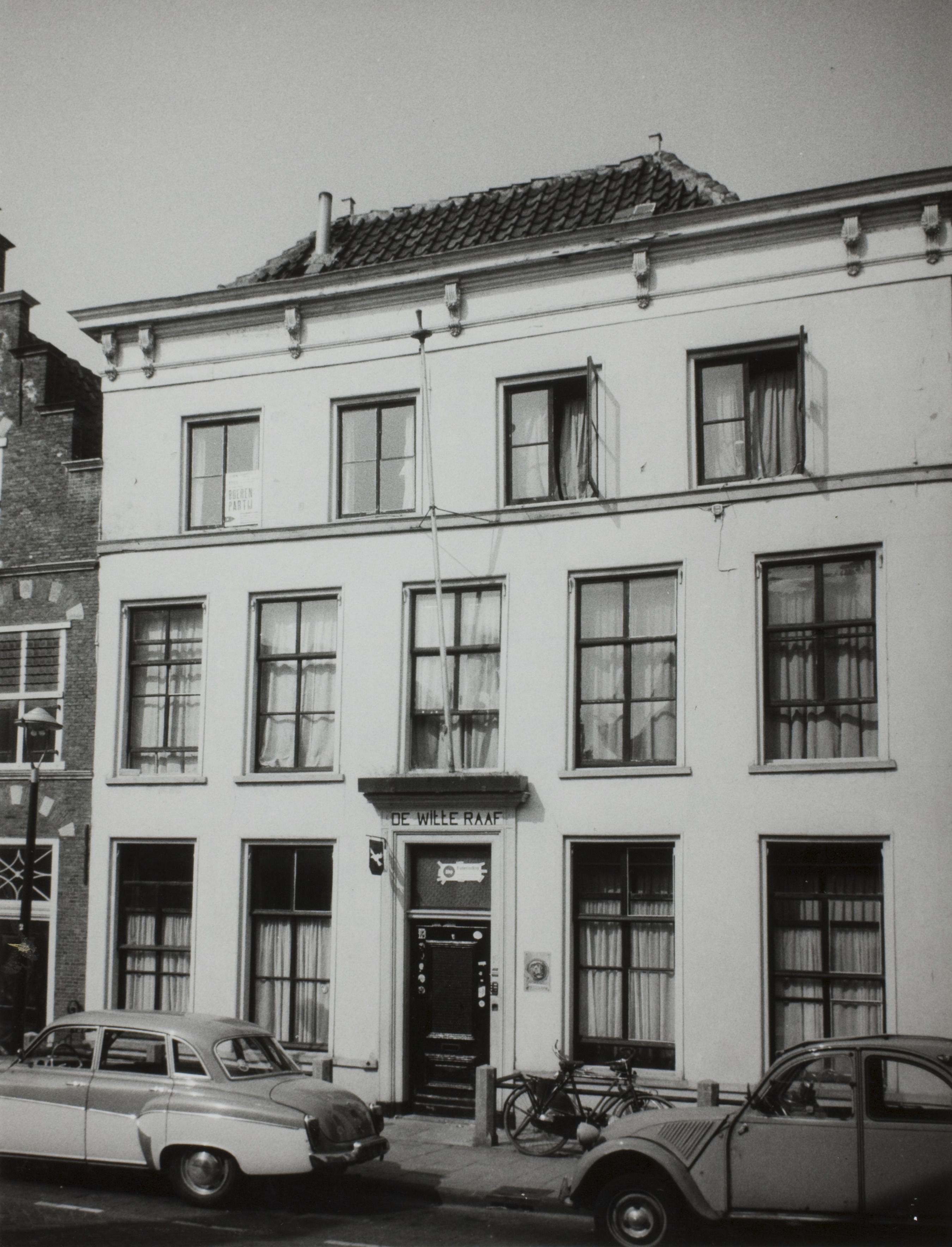 Voorgevel Papengracht 19 (thans: Papengracht 17). Collectie: Topografisch Historische Atlas. Datum vervaardiging: 1972